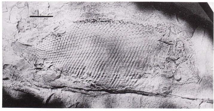 Ctenognathichtlrys beLlottii (De Alessandri 1910): the holotype from Perledo, stored et the Liceo Ginnasro Statale 'A.Volta', Como, Italy